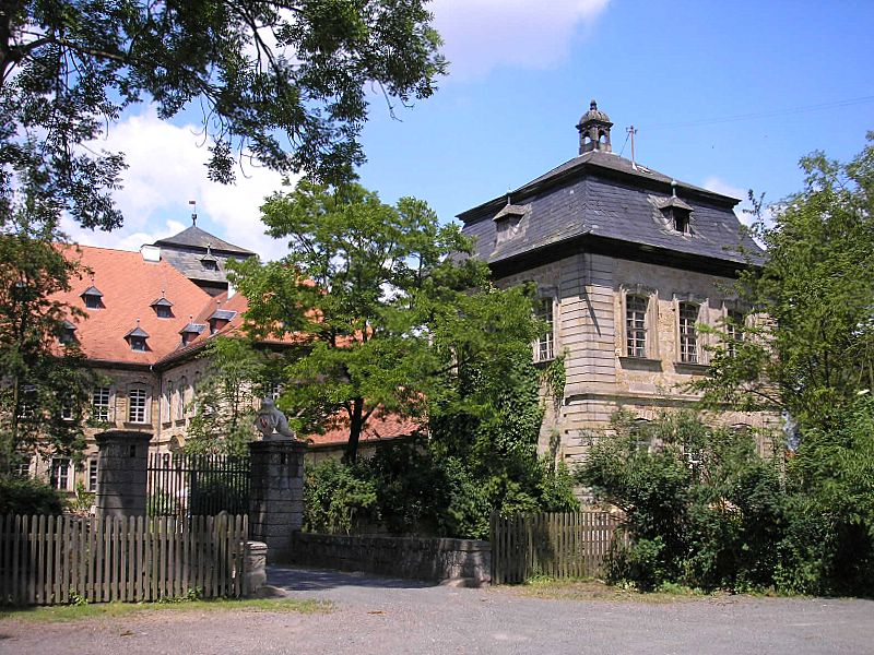 Schloss Burgpreppach (Landkreis Haßberge, Unterfranken) / Burgpreppach Castle, Franconia, Germany. Ansicht von Südosten / View from southeast. Eigene Aufnahme, Juni 2006 / Own photo, June 2006